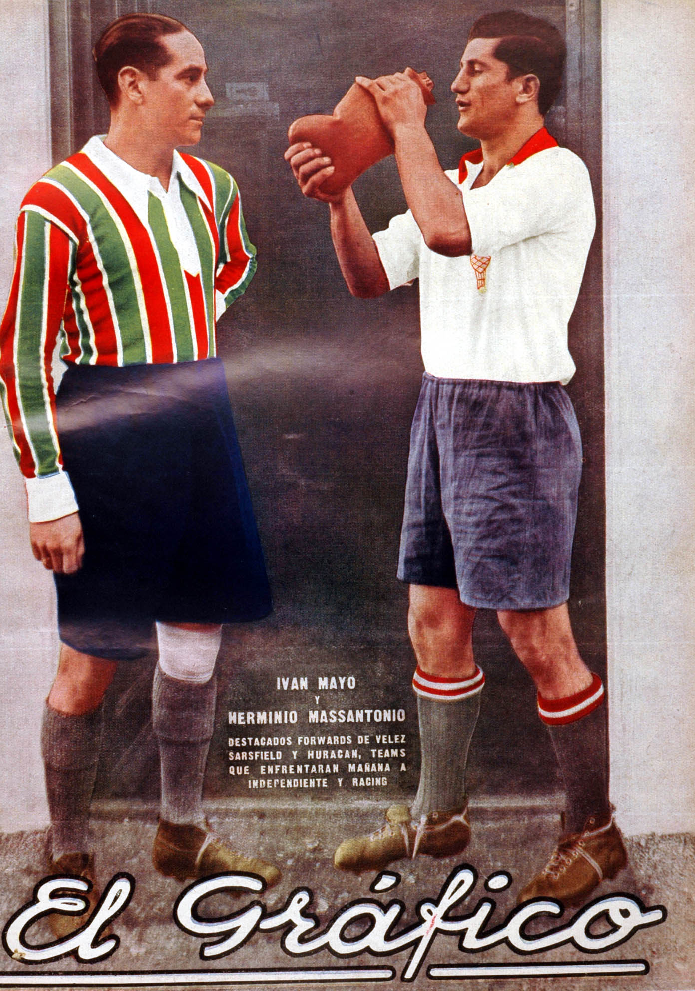 El Grafico del 26 de Agosto de 1933. Edicion 737